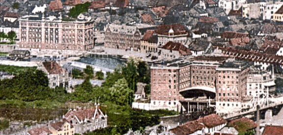 Wesermühlen in Hameln um 1900